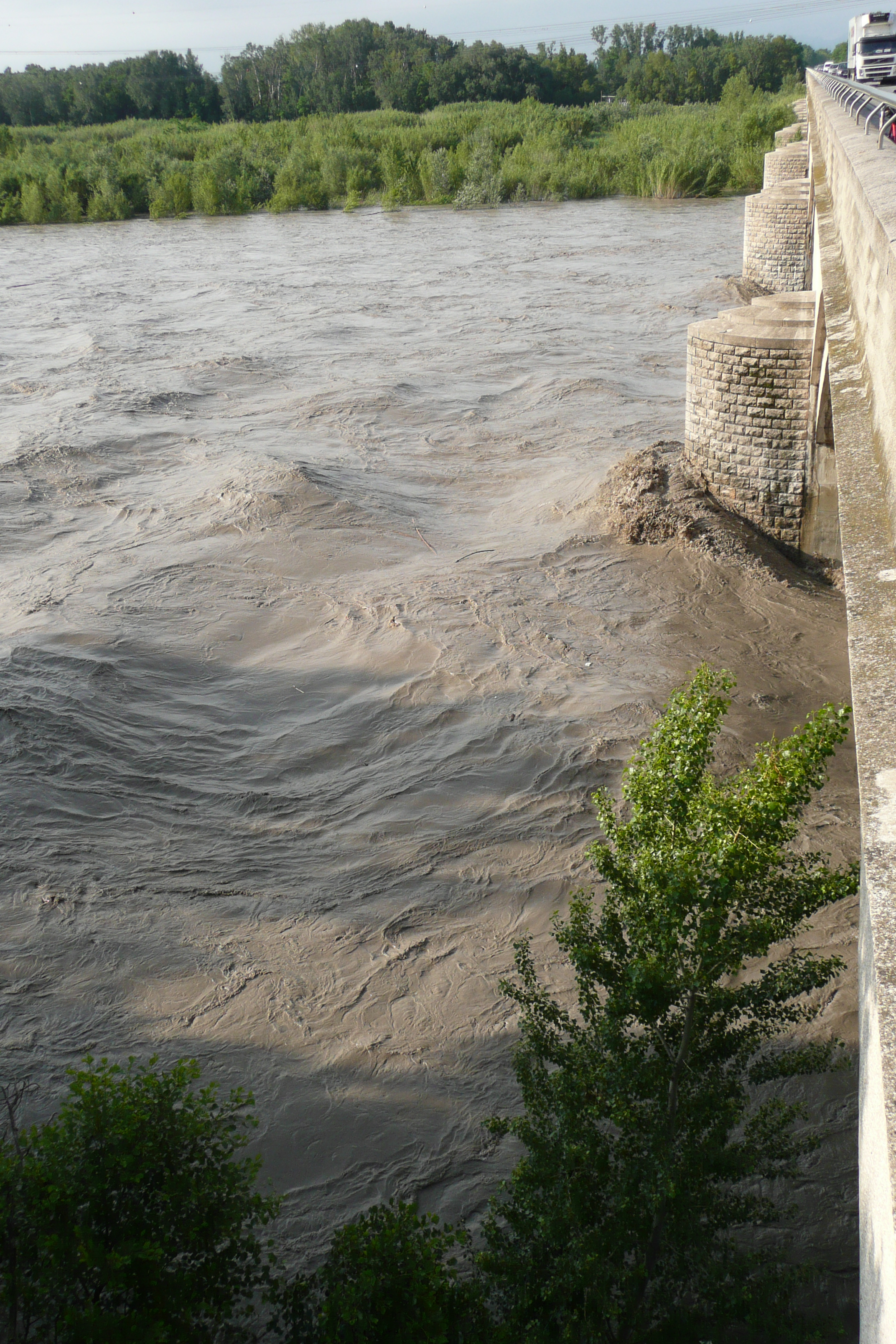 La Durance le 31 mai 2008 avec débit de 1500 mètres cubes par seconde soit 4,5 mètres près de Caumont-sur-Durance.